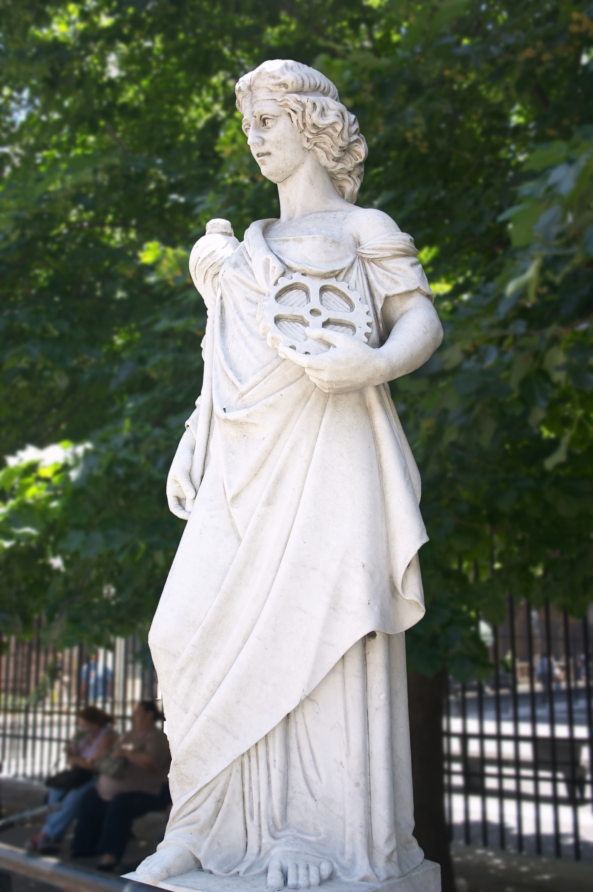 Estatua de la Industria, cuando estaba aun en la Plazoleta San Francisco, Buenos Aires, Argentina. Esquina de Defensa y Alsina, Barrio de Monserrat.